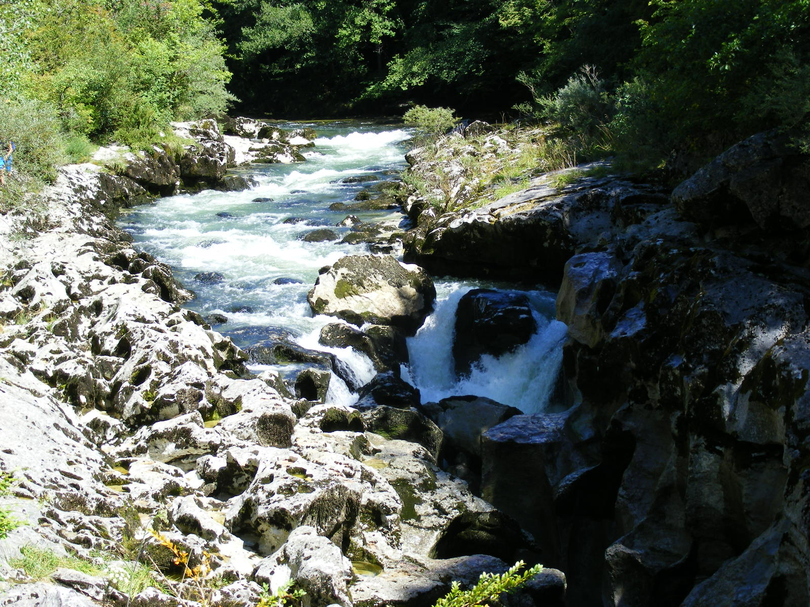 La rivière s'engloutie dans les roches